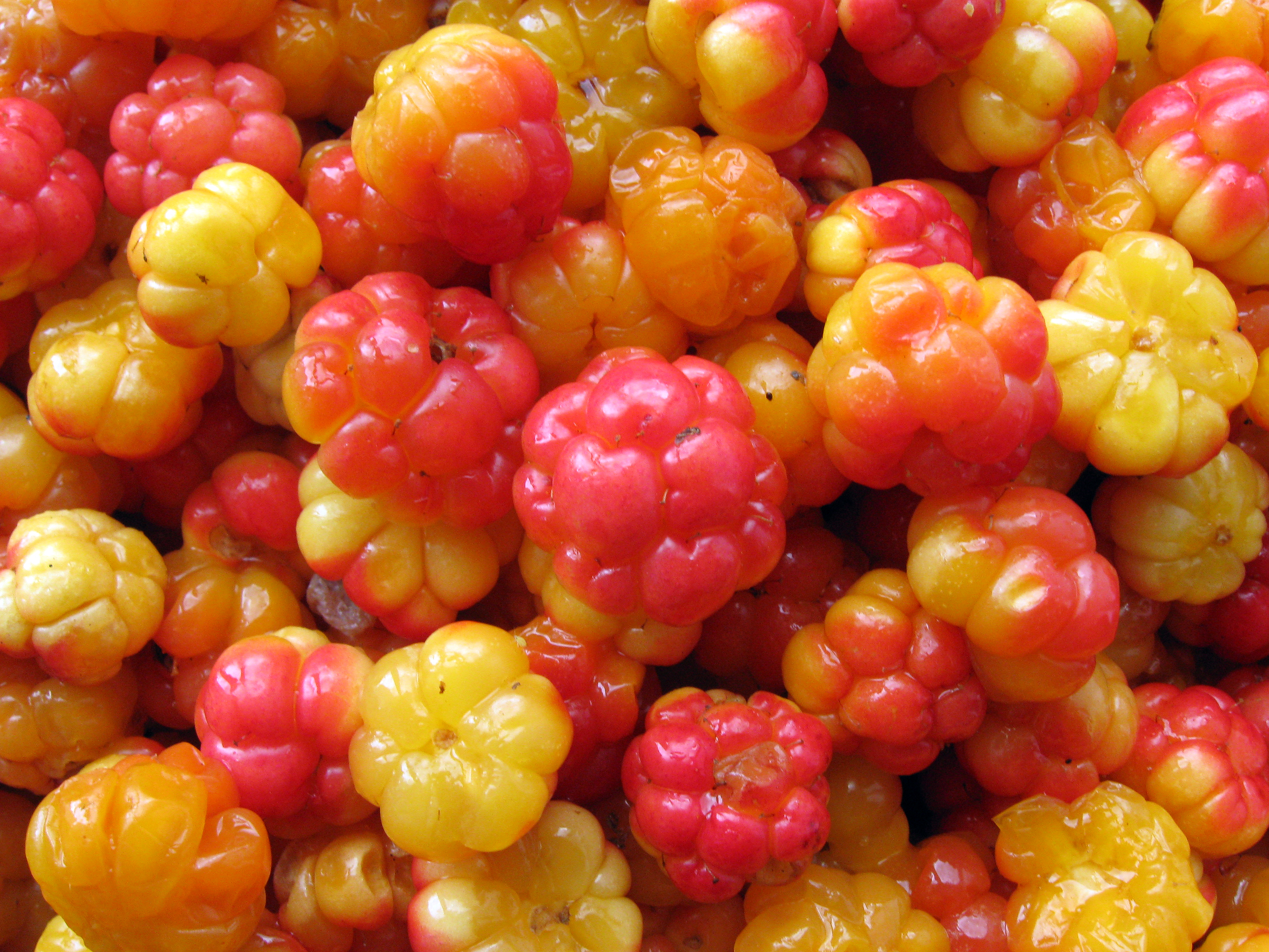 Ягоды морошки очищенные. Собраны в Карелии на Олонецкой низменности. Фото выполнено после очистки сразу после сбора